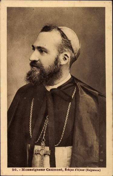 Mgr Caumont OFM cap. (1871-1930), évêque d'Ajmer.